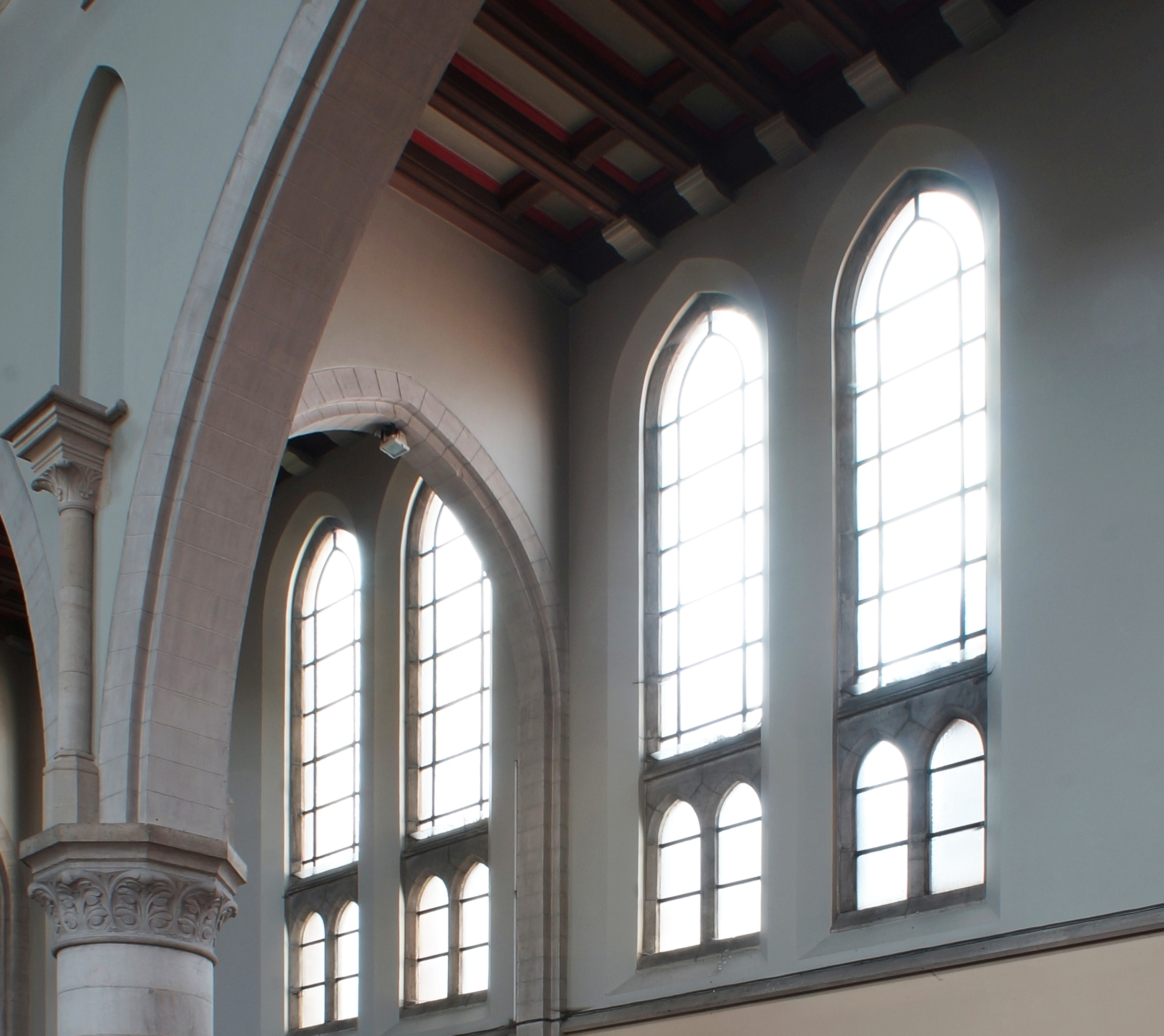 De Sint-Albertuskerk te Schaarbeek heeft een zeer helder interieur: pilaren, kapitelen en arcaden in witte steen.